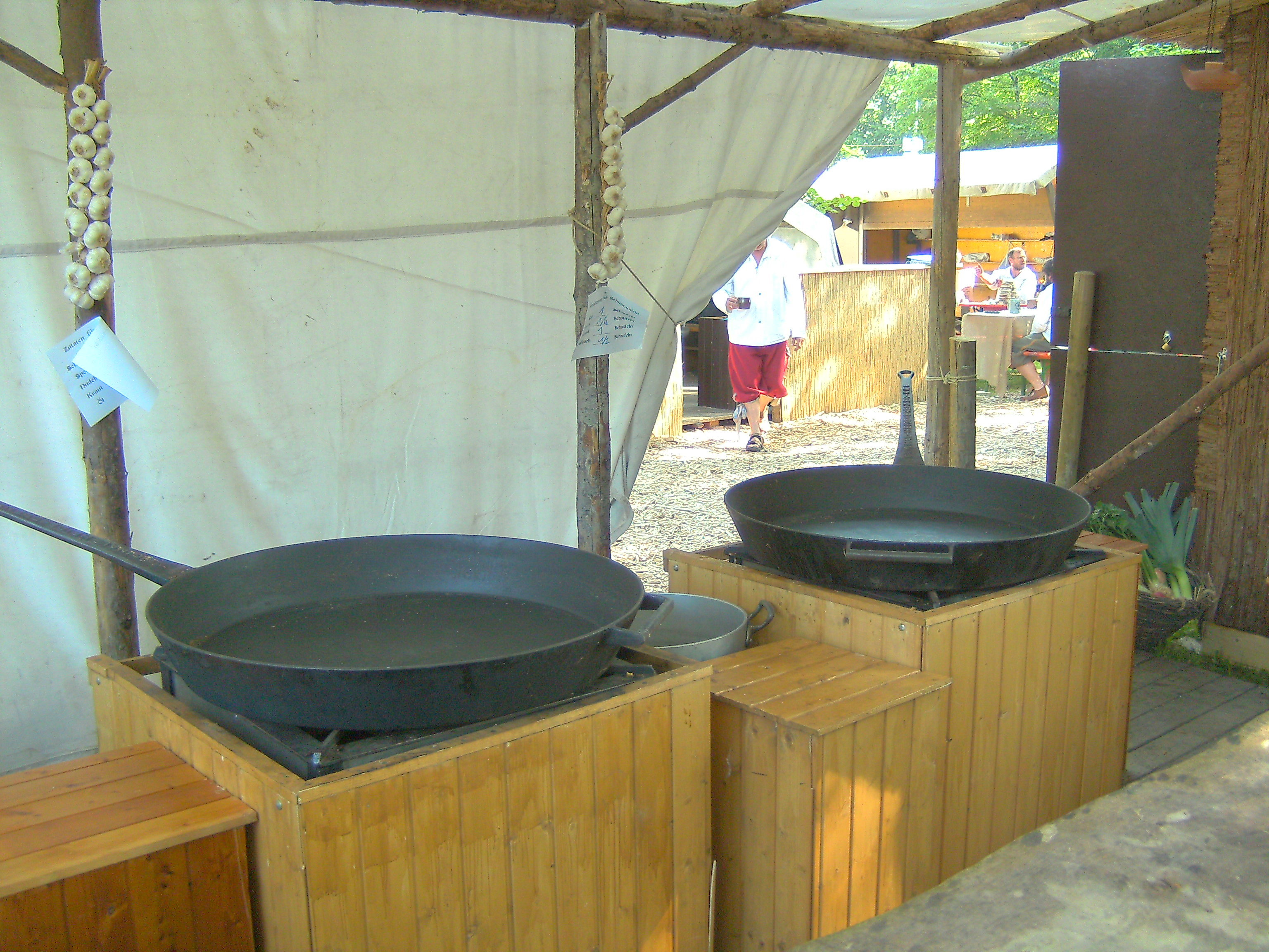 Wallensteinfestspiele - Das große Heerlager am morgen nach dem Umzug - Reich der Marketenderinnen